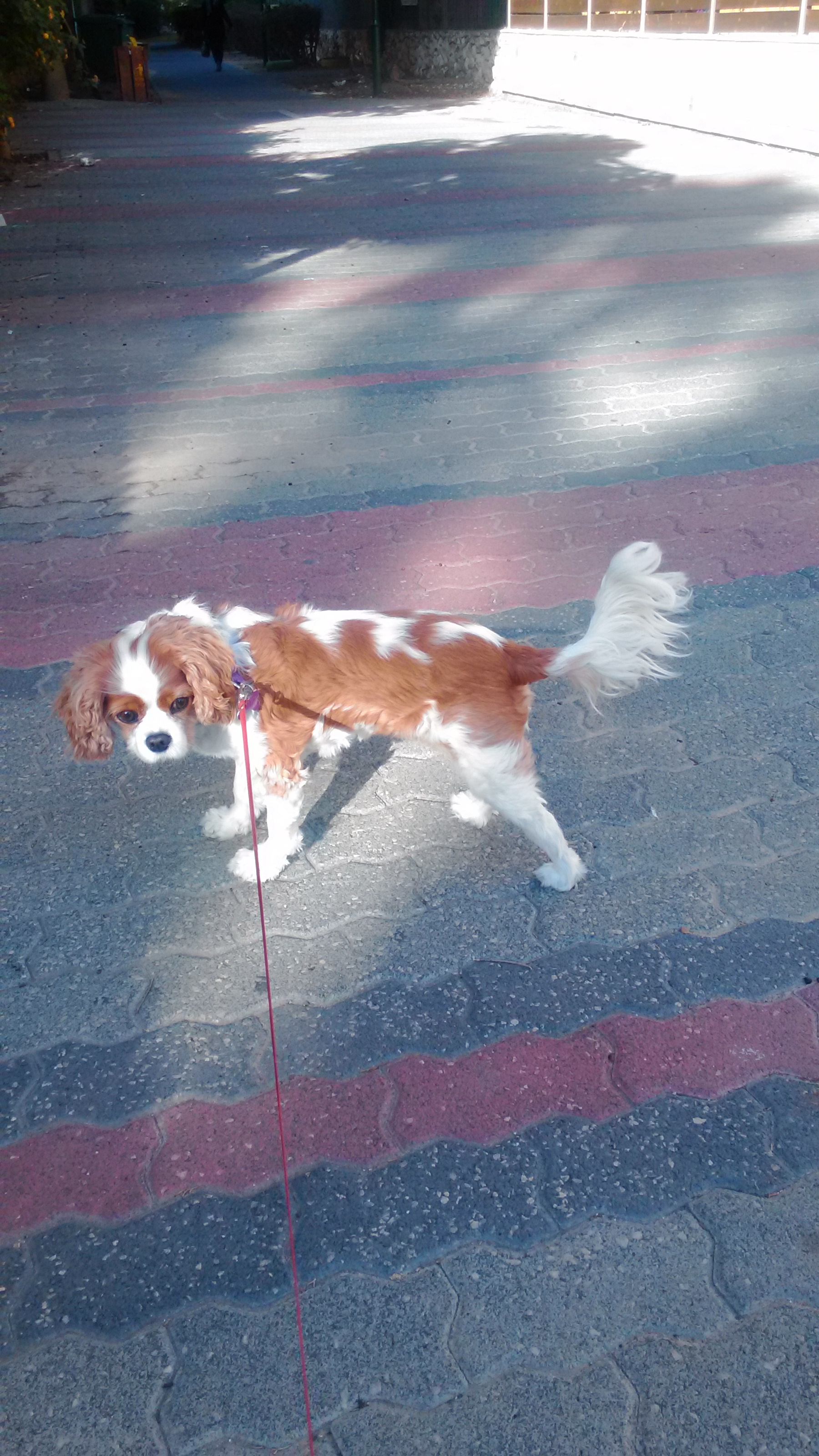 קבליר קינג צ'ארלס ספנייל בעת טיול מחוץ לבית